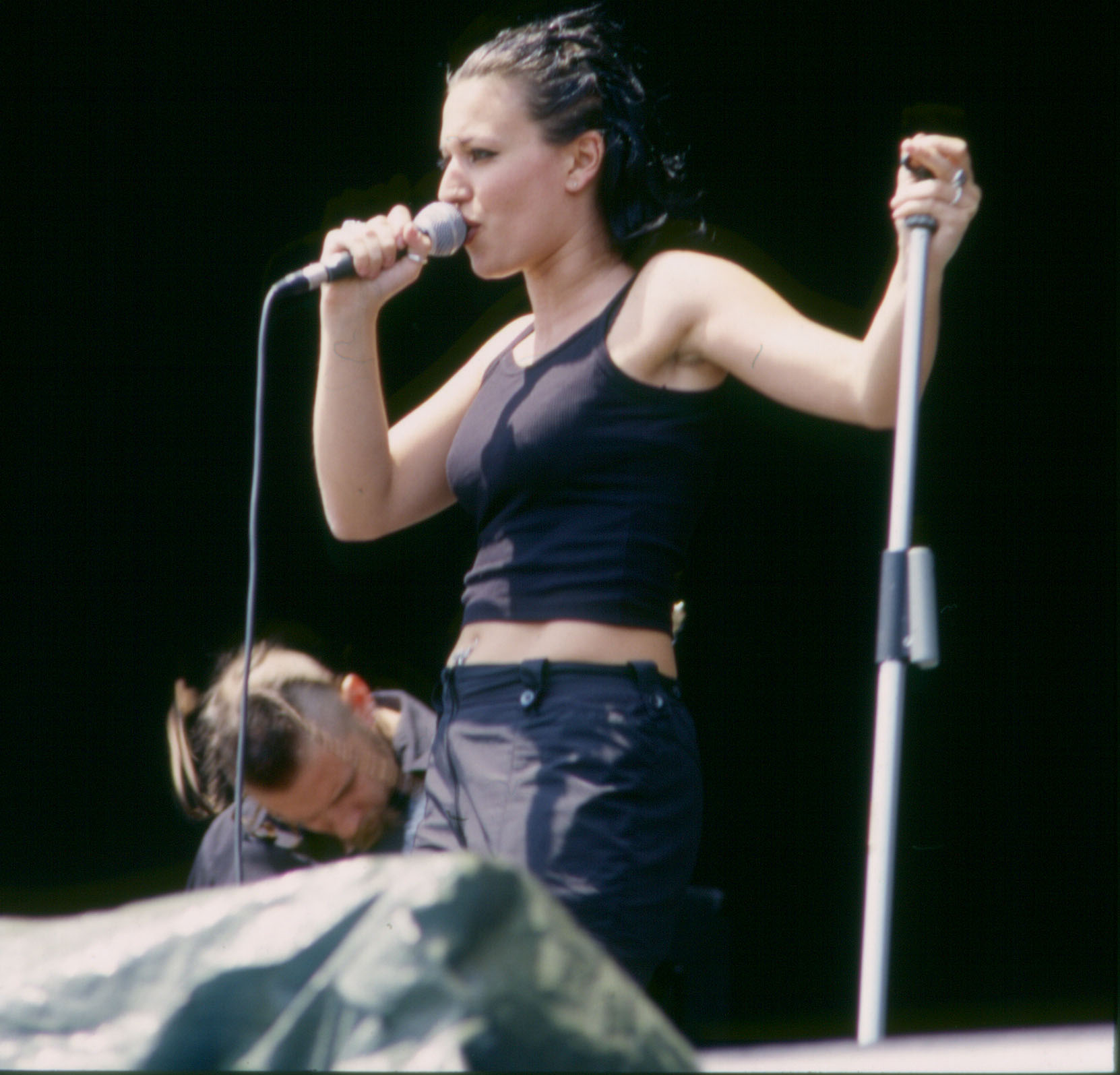 Cristina Scabbia at a Lacuna Coil concert.